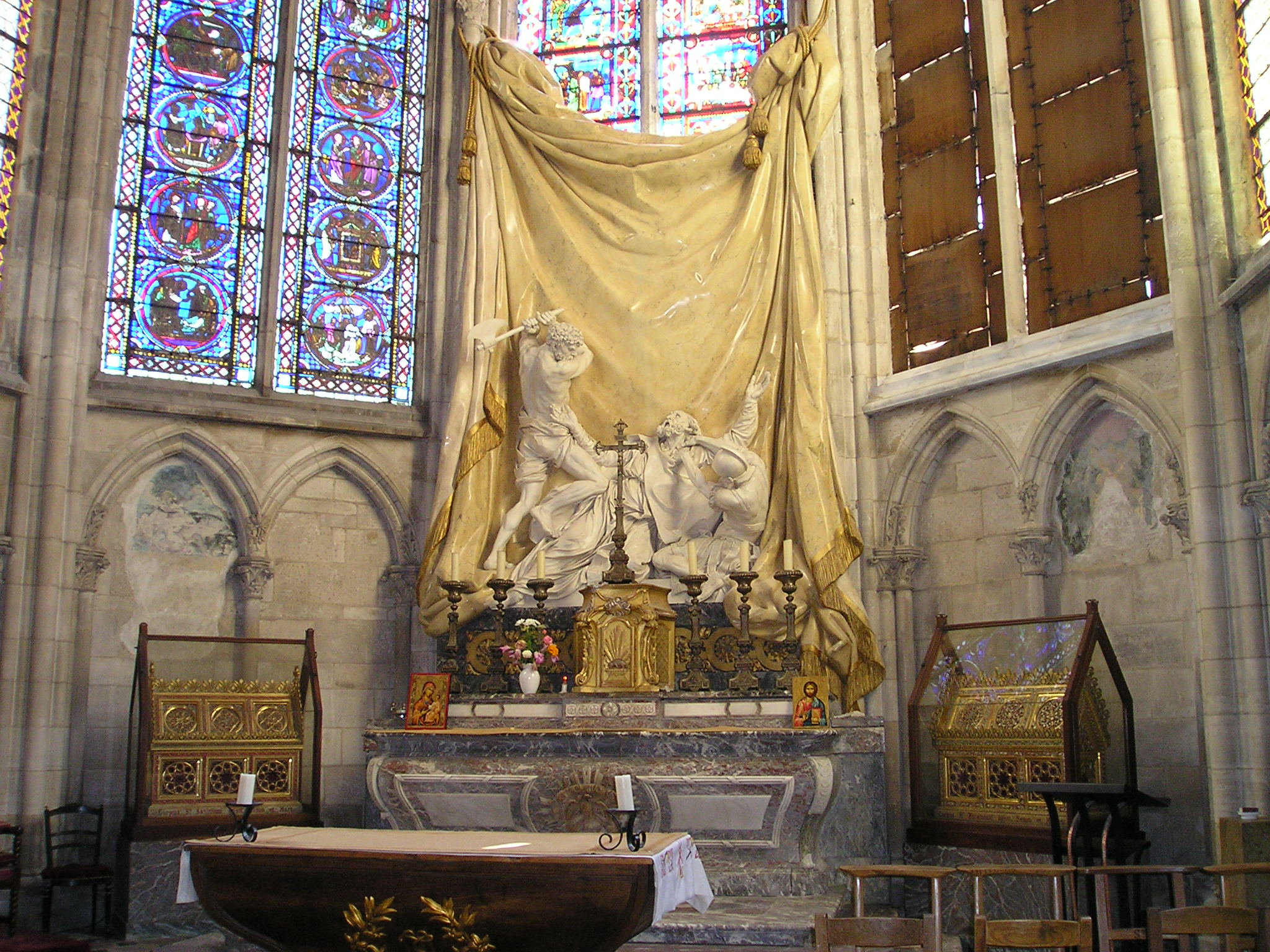 Kathedrale_von_Sens, Enthauptung des Kolumba